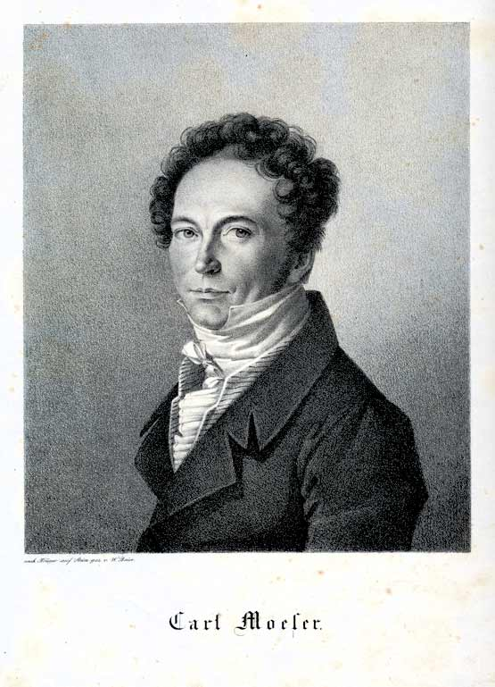 Lithographie von W. Beise nach einer Zeichnung von Franz Krüger, verzeichnet im Katalog von Margarete Cohn: Franz Krüger, Leben und Werk. Diss. 1909, Schatzky, Breslau, S. 104